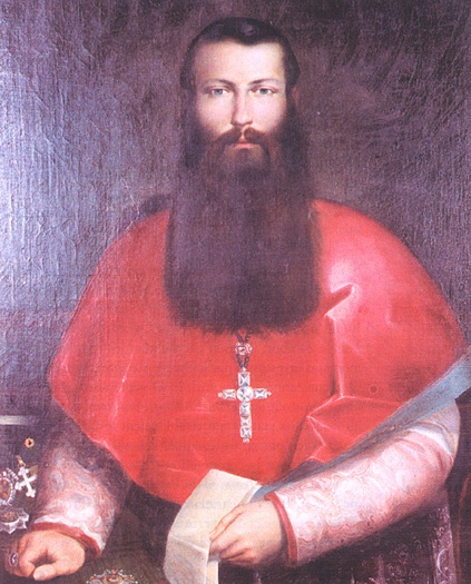 Joseph (Giuseppe) Valerga, Lateinischer Patriarch von Jerusalem